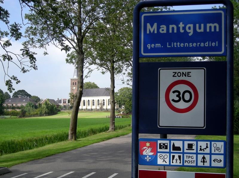 Mantgum